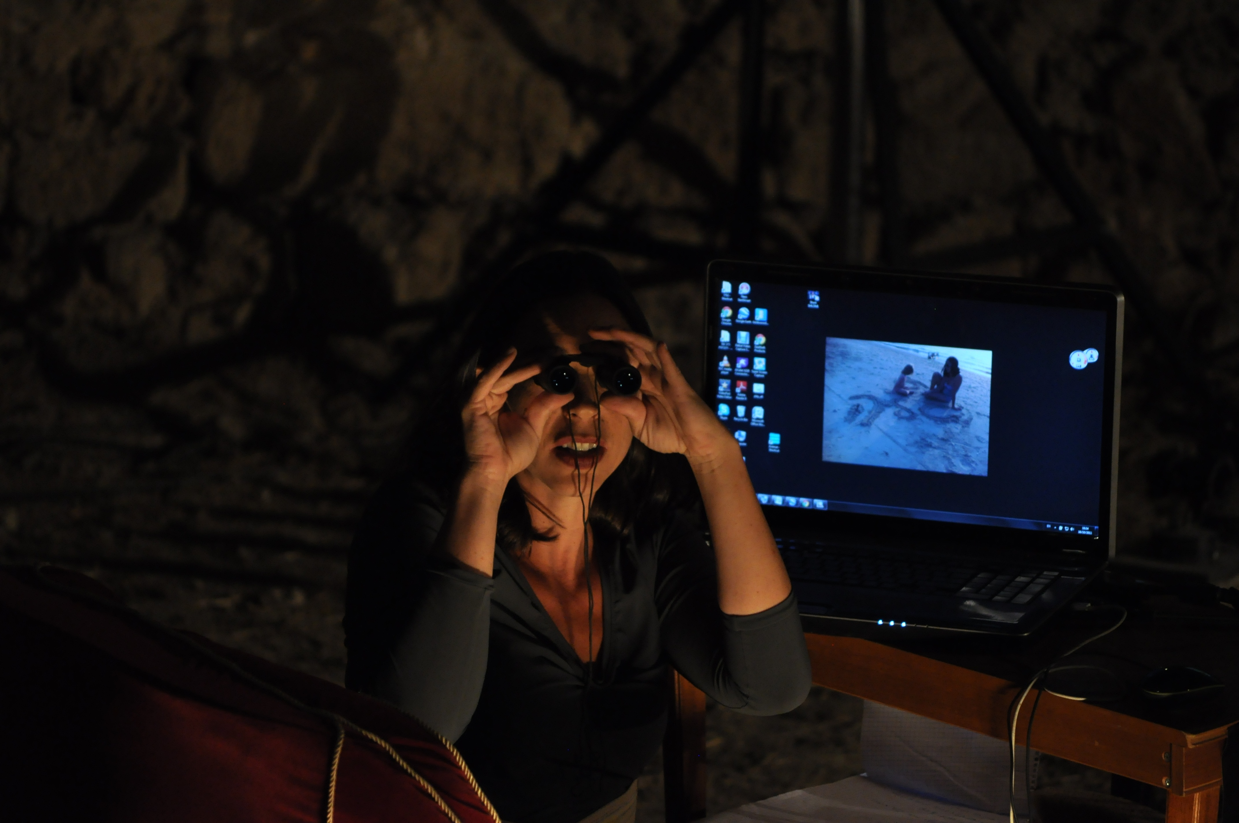 גליה יואלי בנפיץ בעכו צילום אורי רובינשטיין